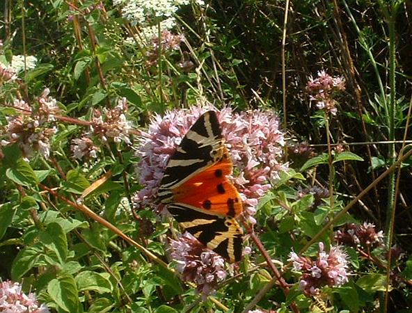 écaille chinée, Bucey-les-Gy